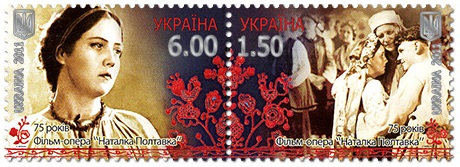 Художні поштові марки, надруковані зчіпкою з двох марок: № 1132 «75 років. Фільм-опера «Наталка Полтавка», № 1133 «75 років. Фільм-опера «Наталка Полтавка» Формат кожної марки – 40х28 мм. Номінал марки № 1132 – 6,00 грн. Номінал марки № 1133 – 1,50 грн. Перфорація гребінчаста – 14:14 1/4. Кількість зчіпок в аркуші – 8 (2х4). Тираж зчіпки – 185 000 примірників. Захист марок: мікротекст «Л.Мельнік»; в УФ променях світяться світлі елементи одягу персонажів фільму. Дизайн марок та штемпеля – Лариси Мельнік. Марки – багатоколірні; спосіб друку – офсет, тиснення фольгою. Марки надруковано на ДП "Поліграфічний комбінат "Україна" по виготовленню цінних паперів". На полях маркового аркуша штриховий код – 4823027131955; Зам. 1-3428. 31.08.2011.